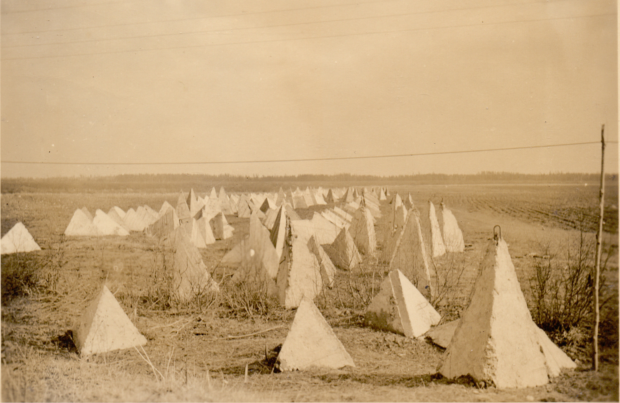 Противотанковые надолбы, расположенные в неизвестном месте СССР